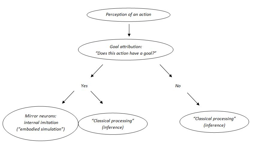 The mirror neurons can be activated only after the goal of the observed action has been attributed by other brain structures.